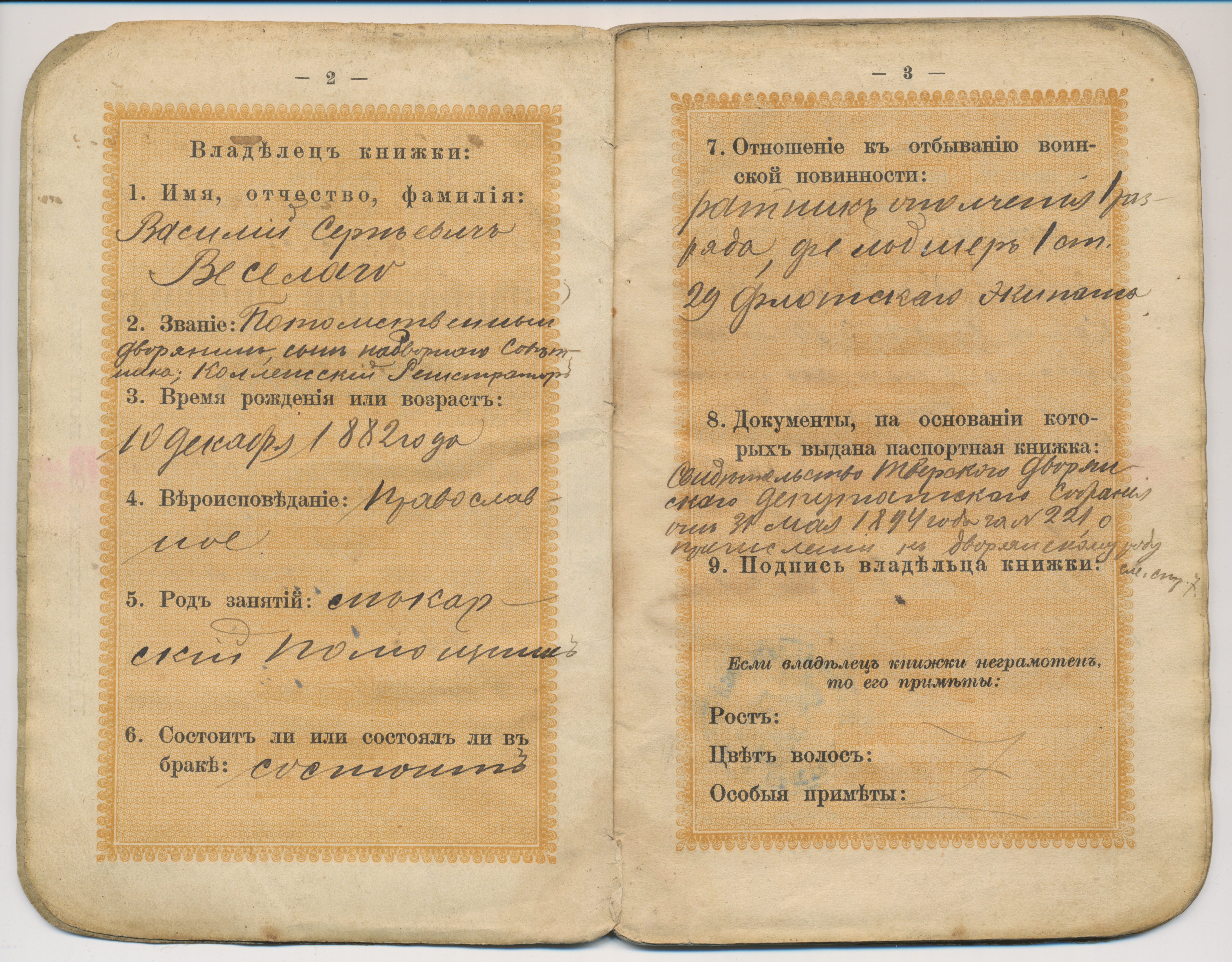 Паспорт Веселаго Василия Сергеевича, с. 2—3 На странице указано следующее: «1. Имя, отчество, фамилiя: Василiй Сергѣевичъ Веселаго 2. Званiе: Потомственный дворянинъ, сынъ Надворнаго Совѣтника; Коллежскiй Регистраторъ 3. Время рожденiя или возрастъ: 10 декабря 1882 года 4. Вѣроисповѣданiе: православное 5. Родъ занятiй: лѣкарскiй помощникъ 6. Состоитъ ли или состоялъ ли въ бракѣ: состоитъ 7. Отношенiе къ отбыванiю воинской повинности: ратникъ ополченiя 1 разряда, фельдшеръ 1 ст. 29 флотскаго экипажа 8. Документы, на основанiи которыхъ выдана паспортная книжка: Свидѣтельство Тверскаго Дворянскаго Депутатскаго Собранiя отъ 31 мая 1894 года за № 221, о пречисленiи къ дворянскому роду см. стр. 7 9. Подпись владѣльца книжки: Если владѣлецъ книжки неграмотенъ, то его примѣты: Ростъ: --- Цвѣтъ волосъ: --- Особыя примѣты: ---» Рукописный текст продолжается на с. 7.